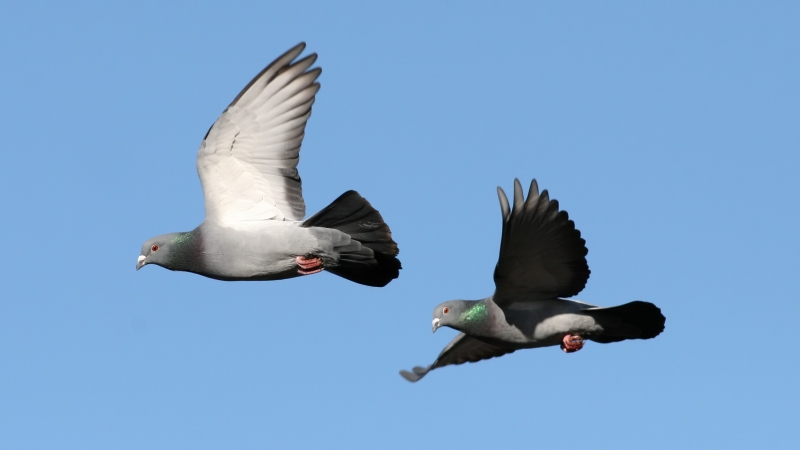 Rock Pigeon (Columba livia)